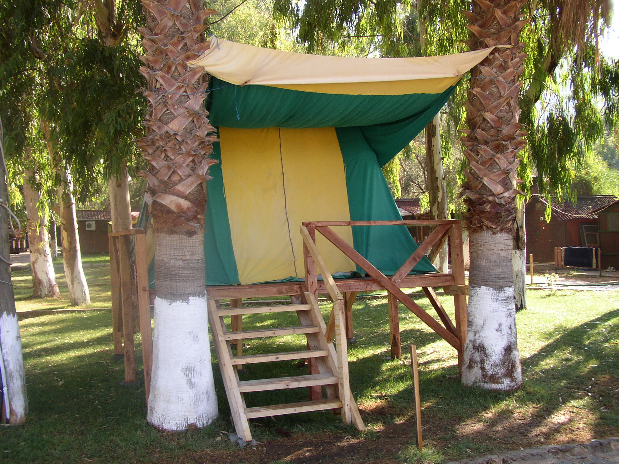 Campsite